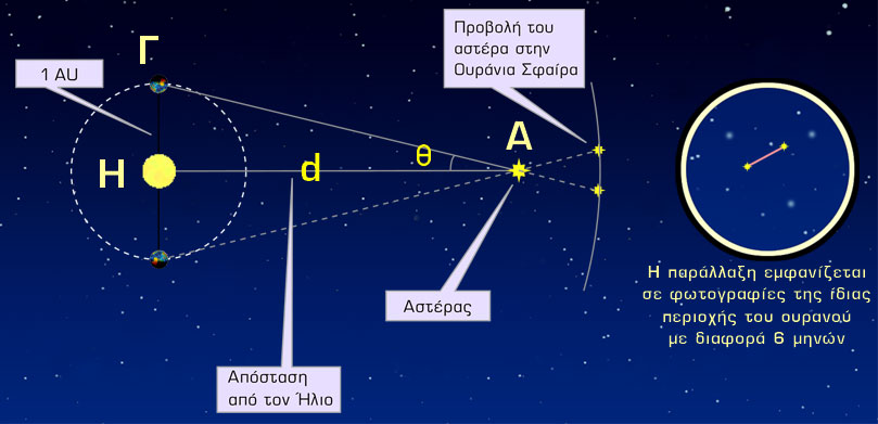 Ετήσια παράλλαξη. Η εικόνα δεν είναι υπό κλίμακα Template:Annual parallax, not in scale